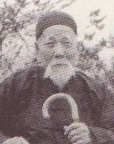 中文（香港）: 1952年周壽臣肖像 Bân-lâm-gú: 1952-nî ê Tsiu Siū-sîn siàu-siōng. 1952年的周壽臣肖像